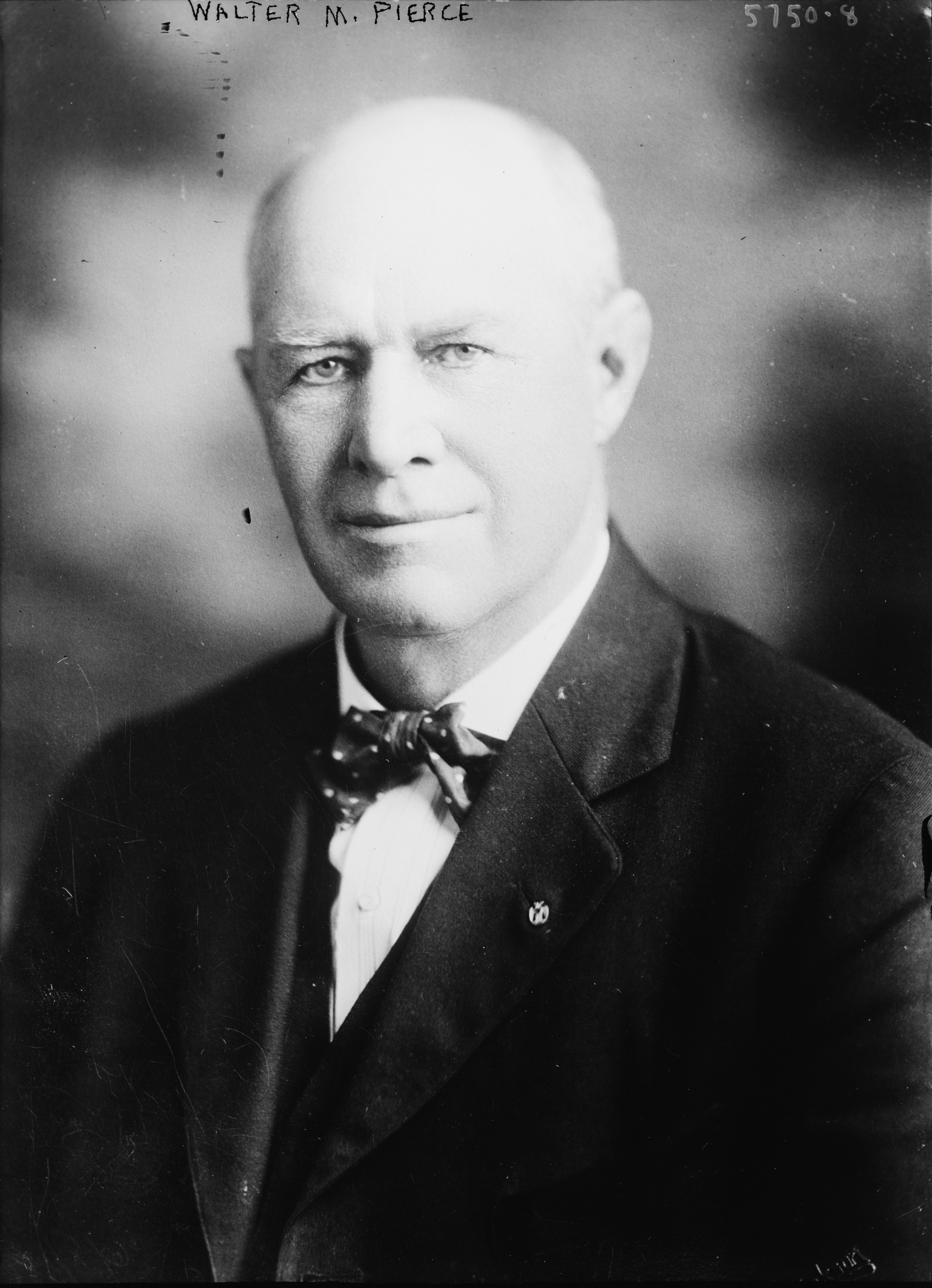 Walter M. Pierce